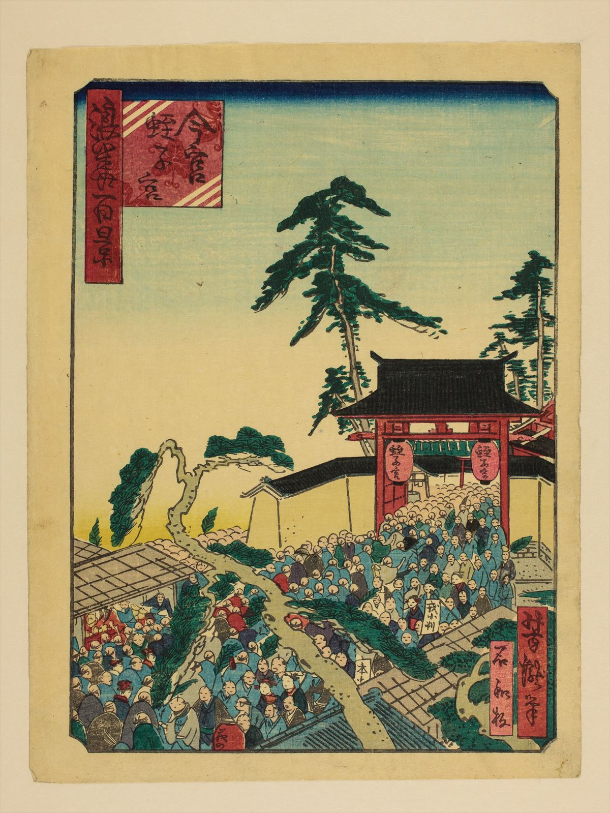 1800年代。里の家芳瀧/画。浪花百景 102枚のうちの1枚。大阪市立中央図書館蔵。